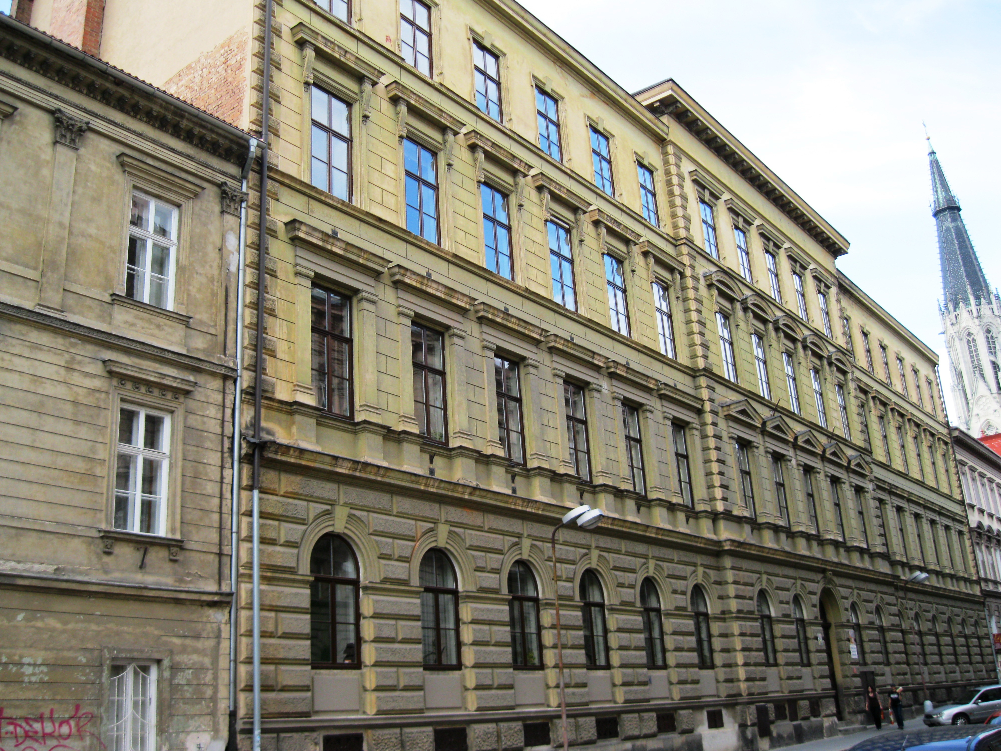 Střední škola – bývalé Slovanské gymnázium (Olomouc), Kosinova 872/4, Olomouc